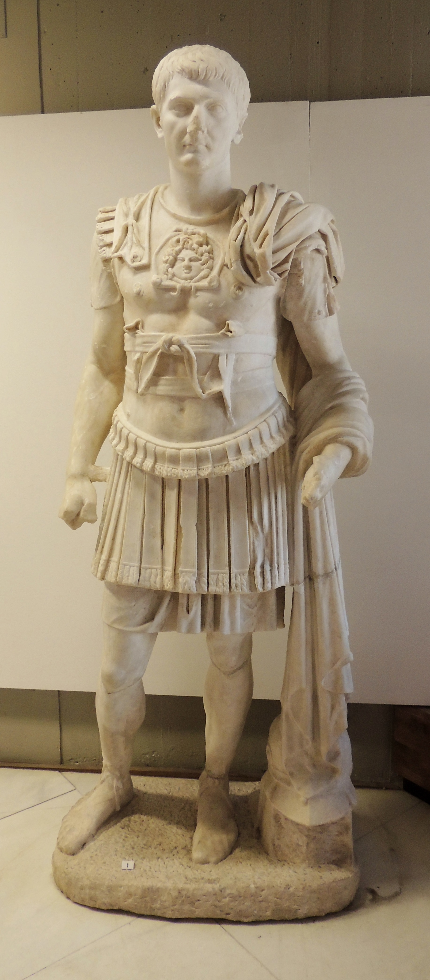 Drusus Julius Caesar statue from Sulcis, Sardinia, Italy